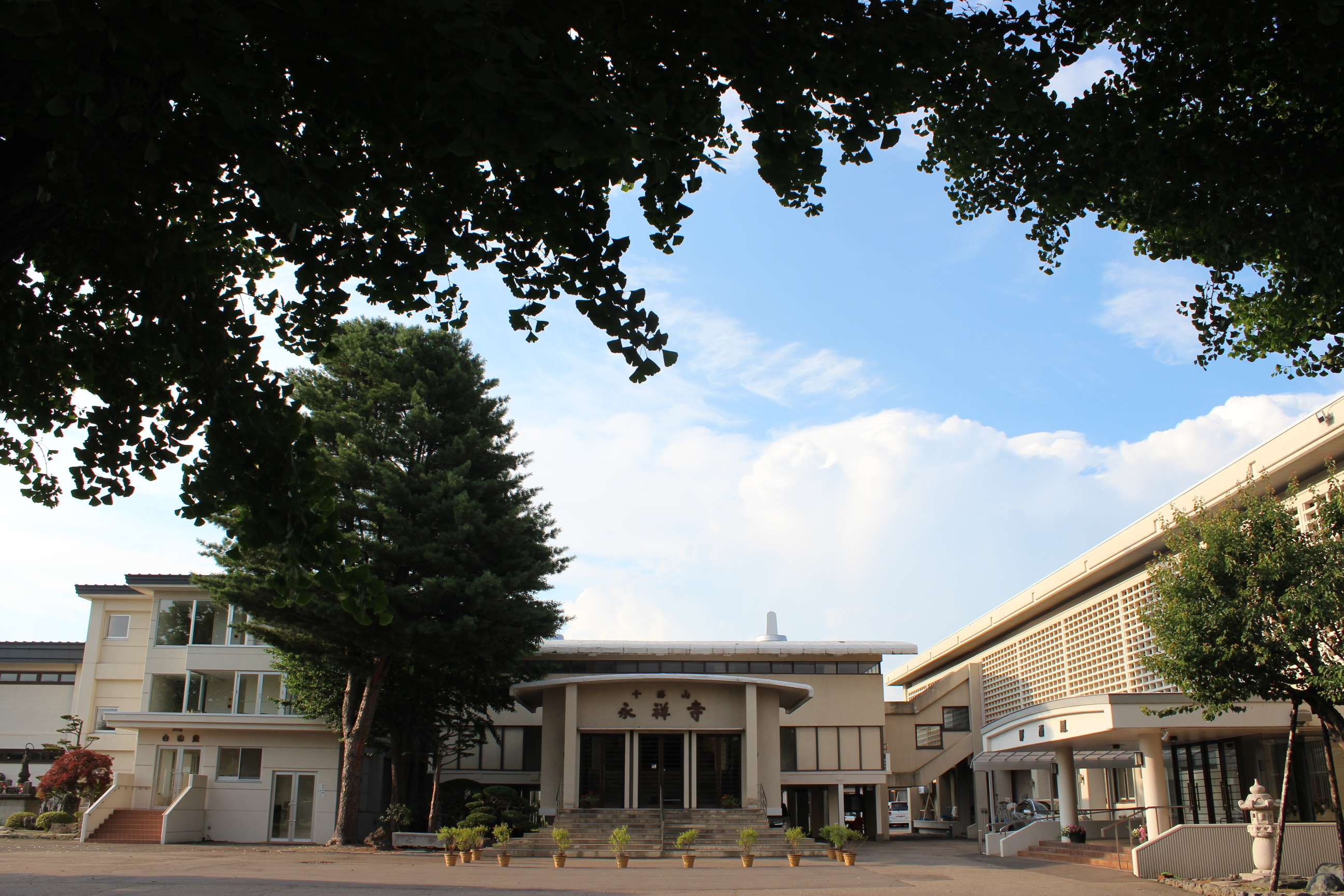 境内から撮影